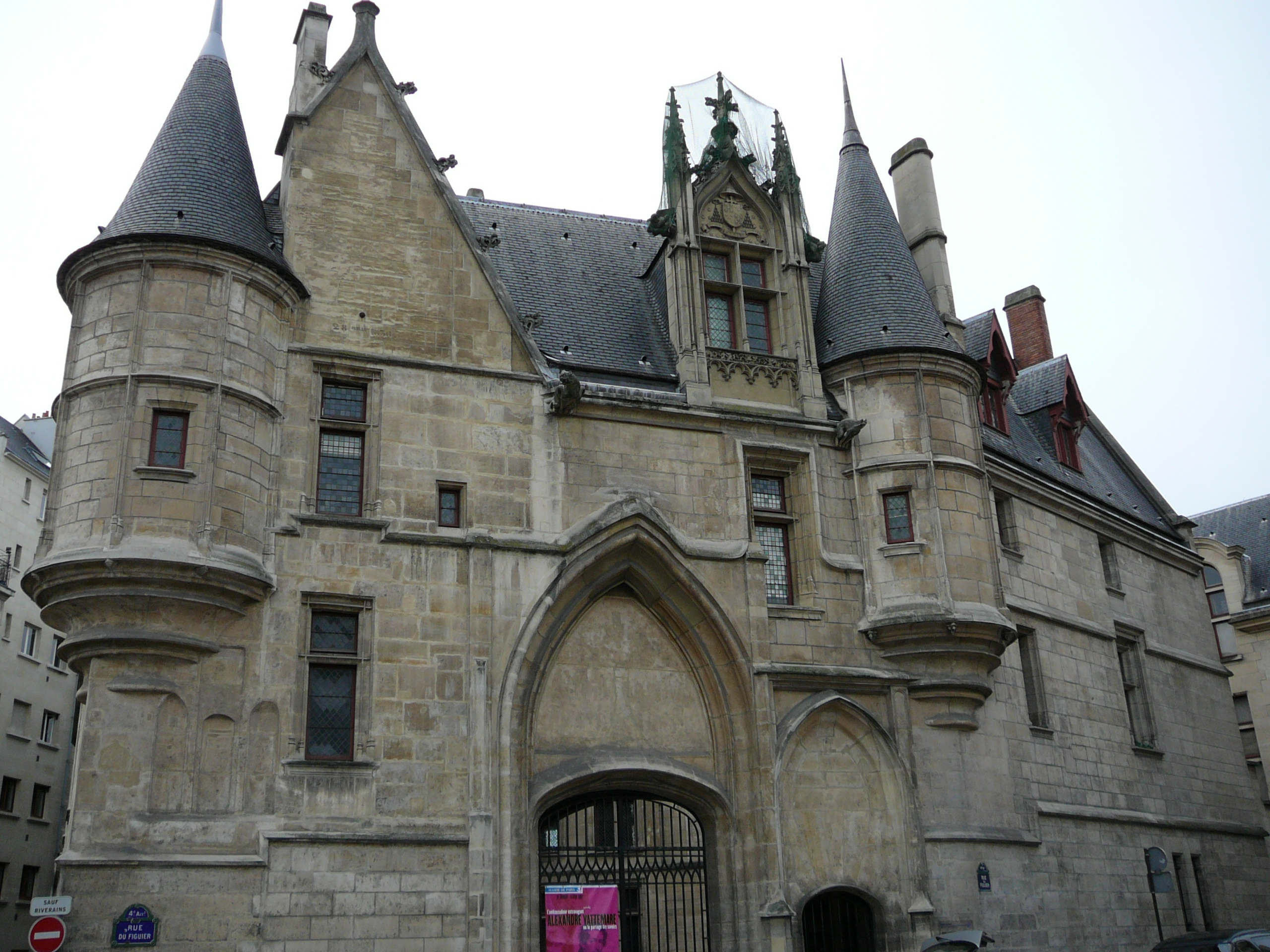 Hôtel de Sens, construit par l'archevêque Tristan de Salazar